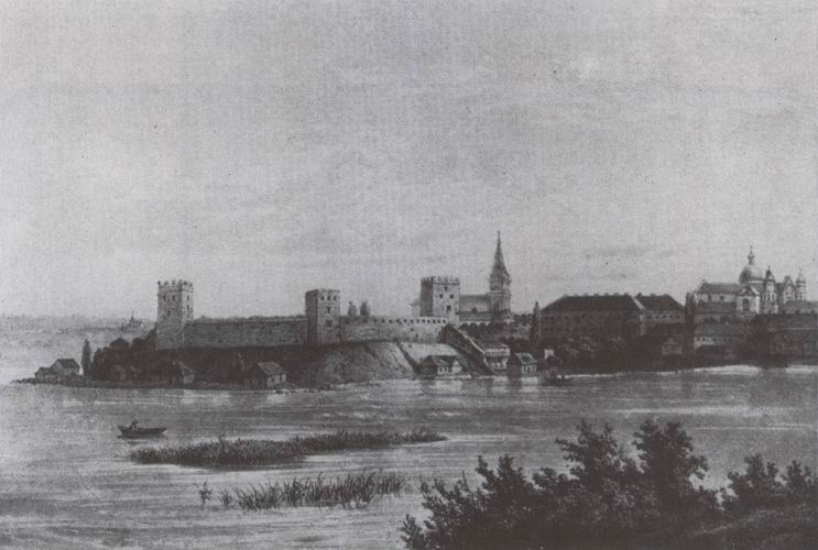 Замок Любарта (Луцький замок)